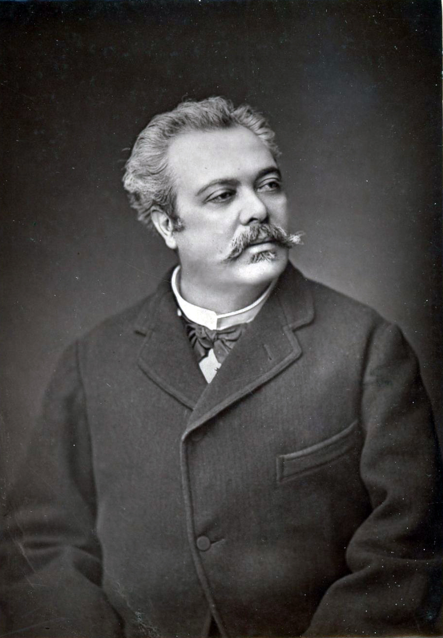 Portrait reproduit dans L'invention de la vie de Bohème : 1830-1900 de Luc Ferry comme étant celui de Sapeck. La photographie porte en légende "Eugène Bataille (Opéra)". Il pourrait donc aussi s'agogir de l'artiste lyrique homonyme [1].